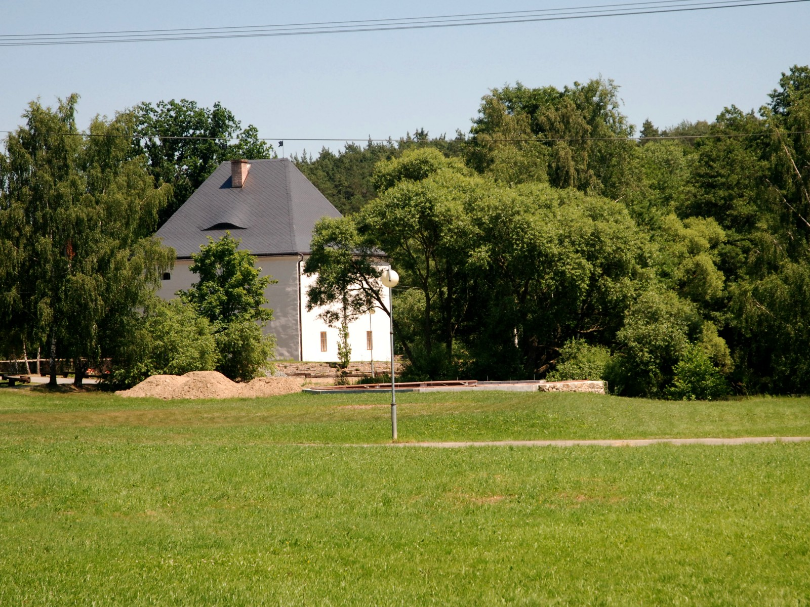 Pernolec - náves